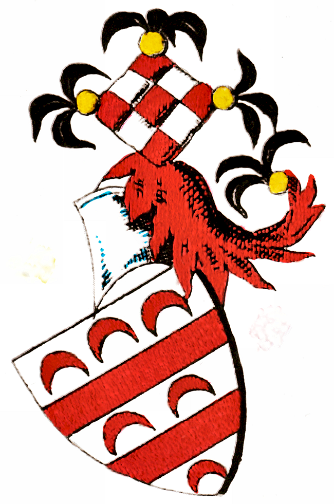 Stammwappen der Grafen von Firmian III